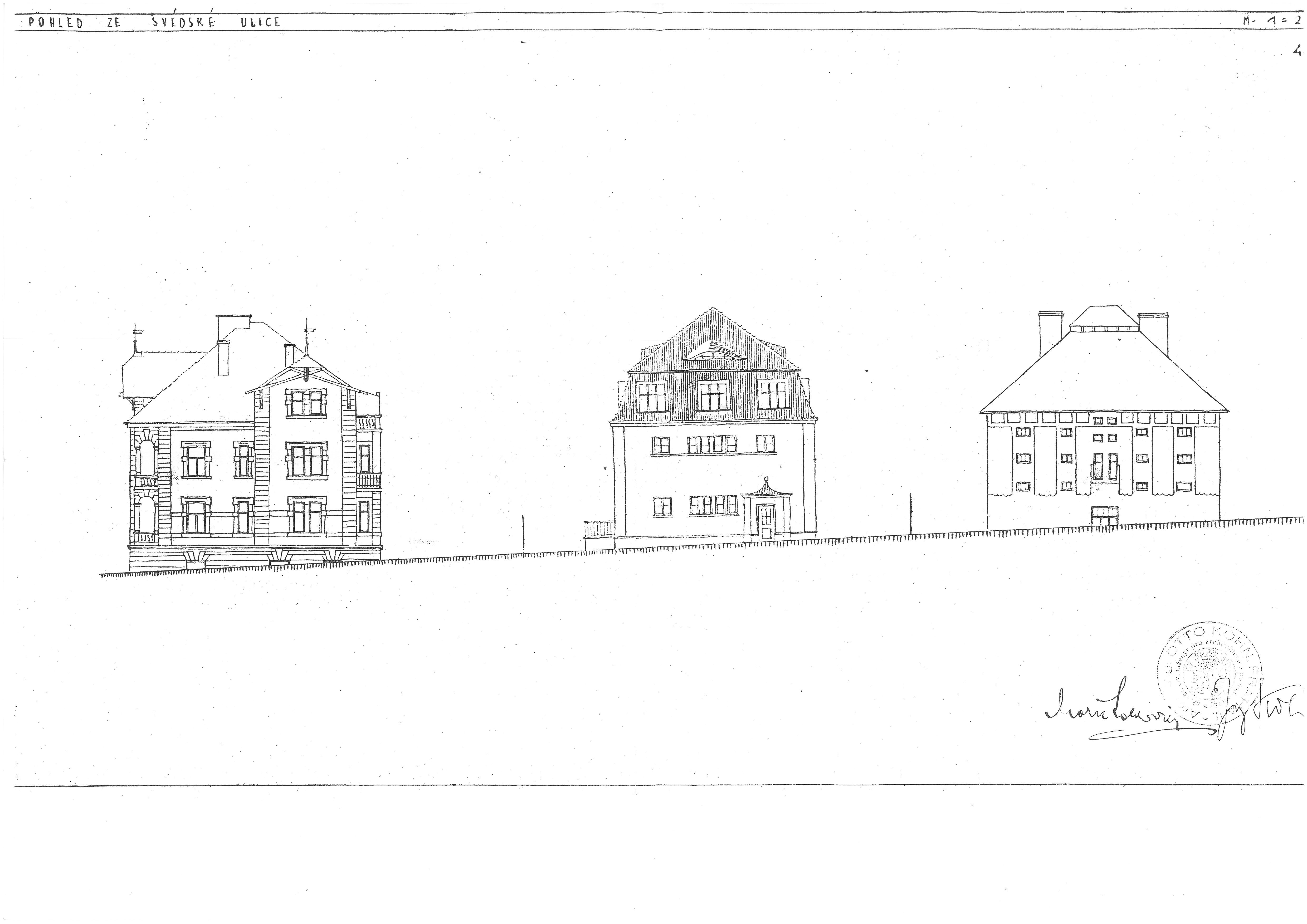 Projekt domu na Hřebenkách, dům je uprostřed. Během stavby doznal ještě zásadních změn. Praha-Smíchov, Švédská čo. 43, 45, 47.